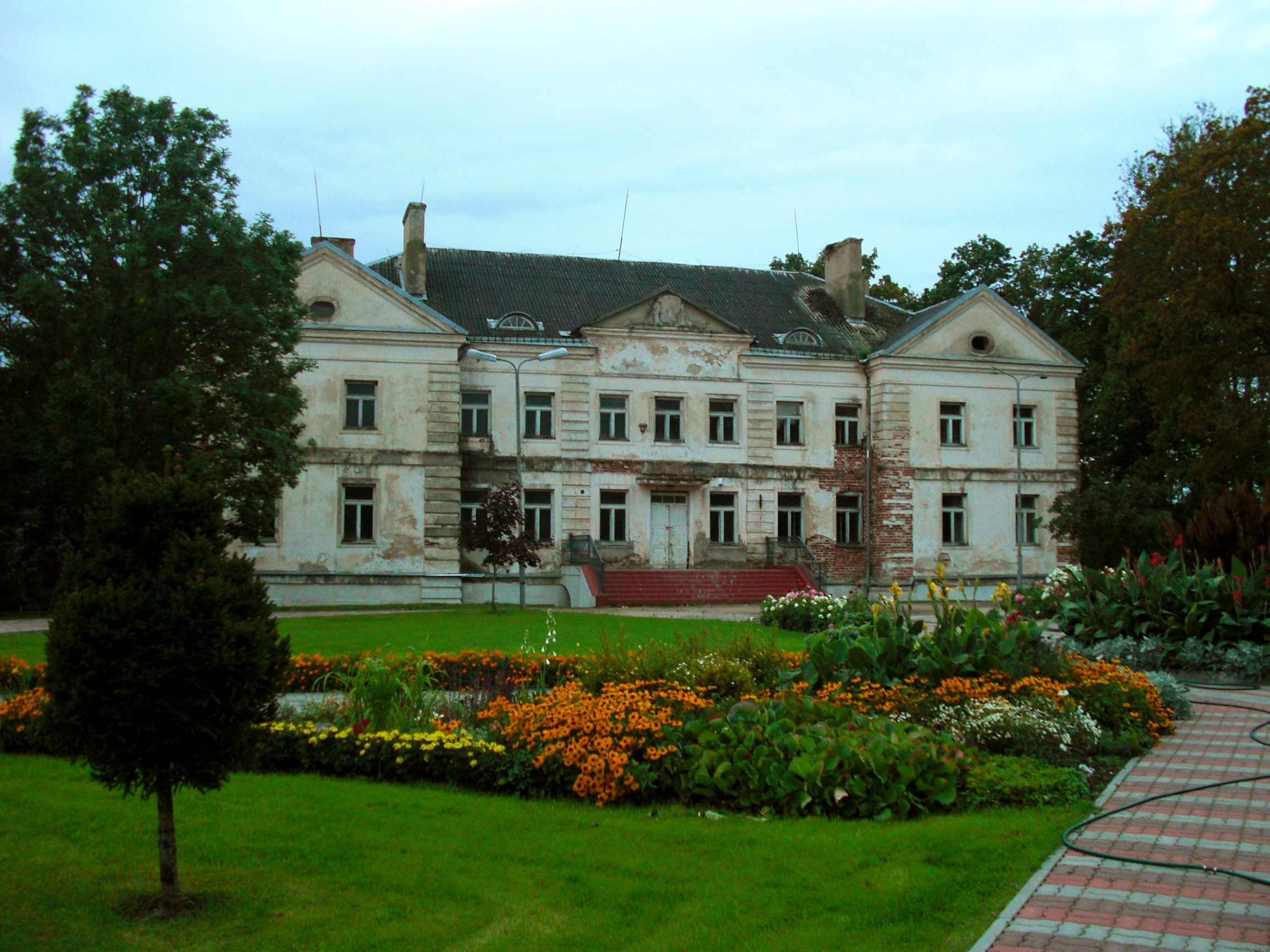 Antazavės dvaras